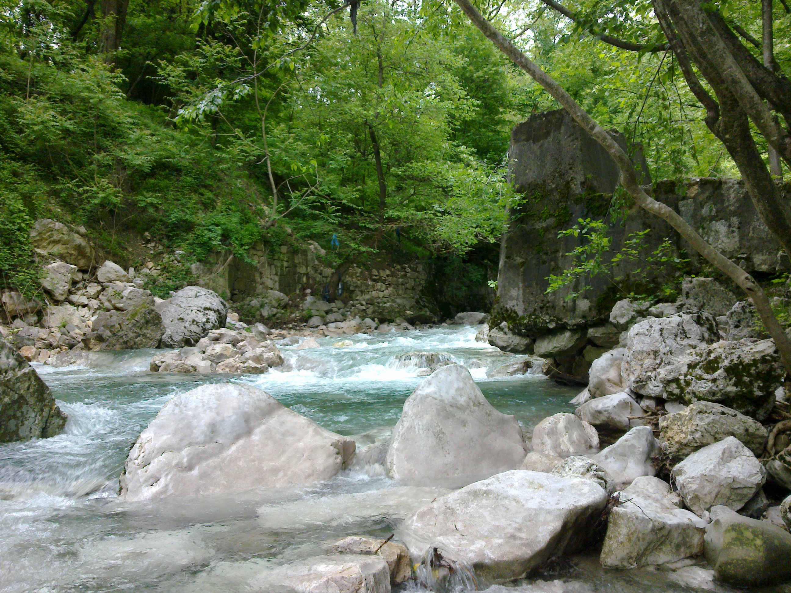 riječina